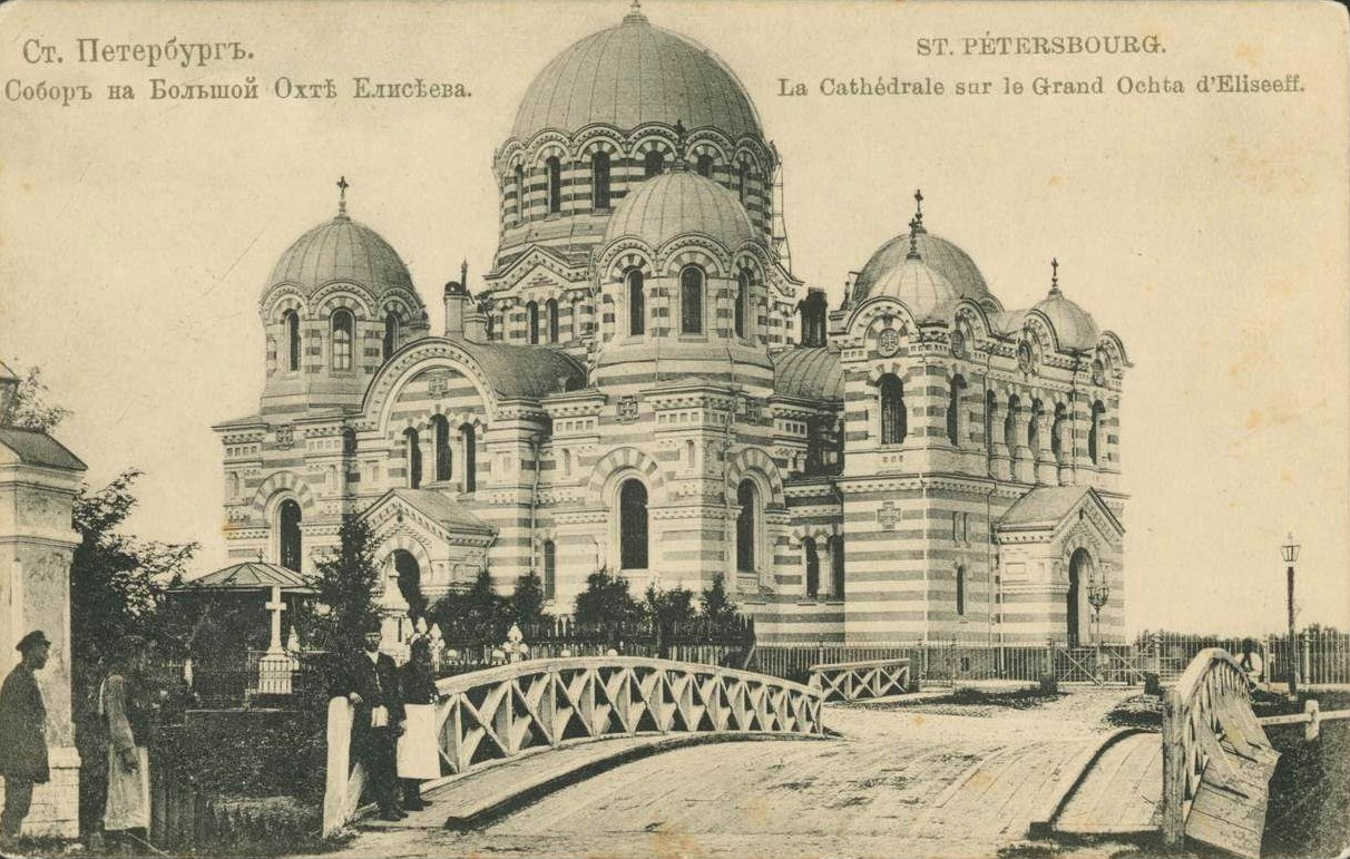 Церковь Казанской иконы Божией Матери при Доме призрения бедных им. С. П. Елисеева (1885–1914), Санкт-Петербург, Большая Охта